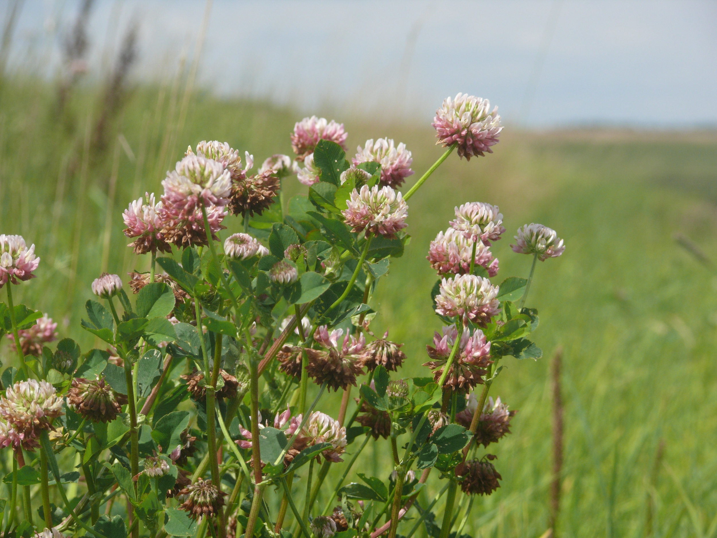 Trifolium hybridum, Hohenlohe, Deutschland